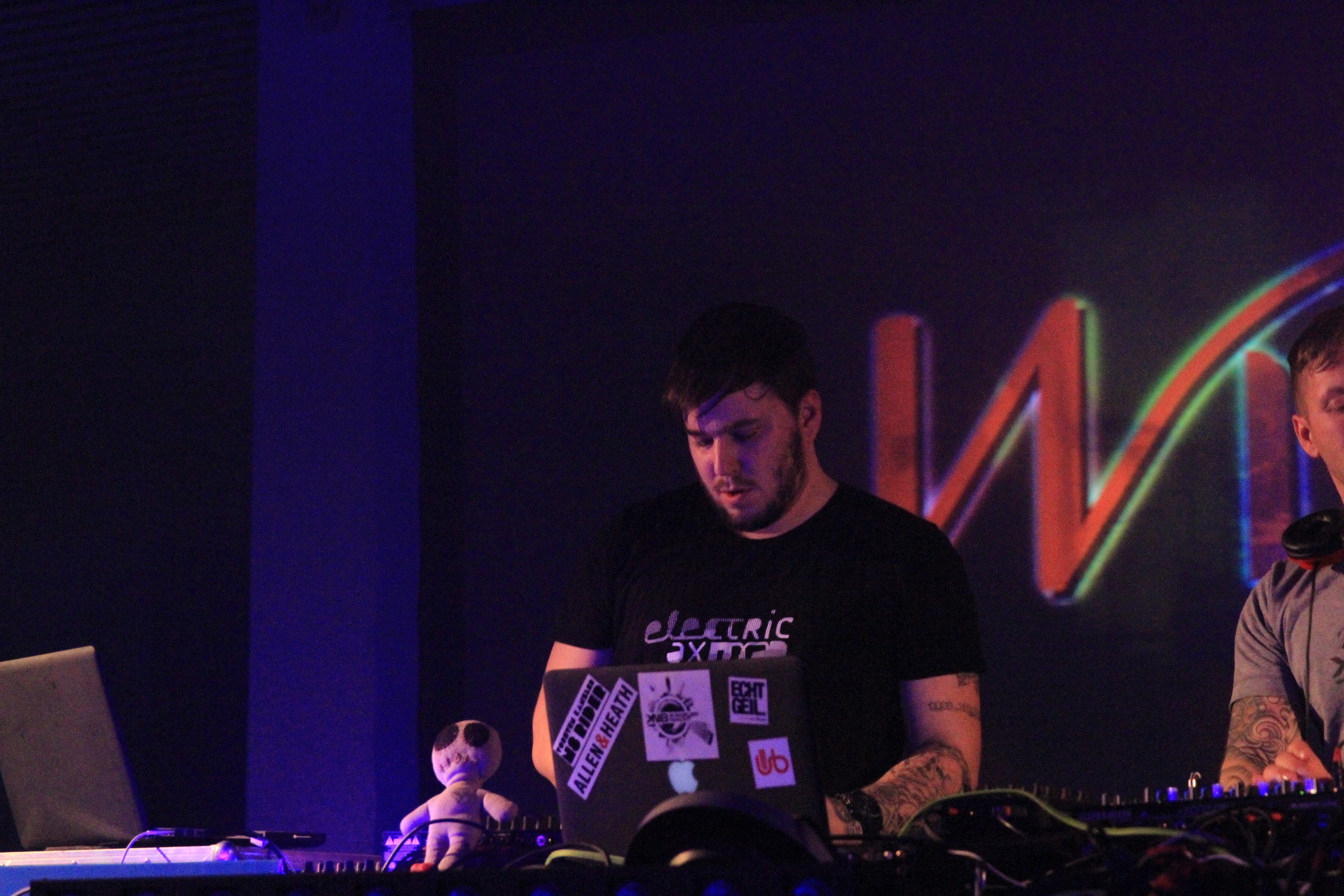 Sven Wittekind auf der Winterworld 2014